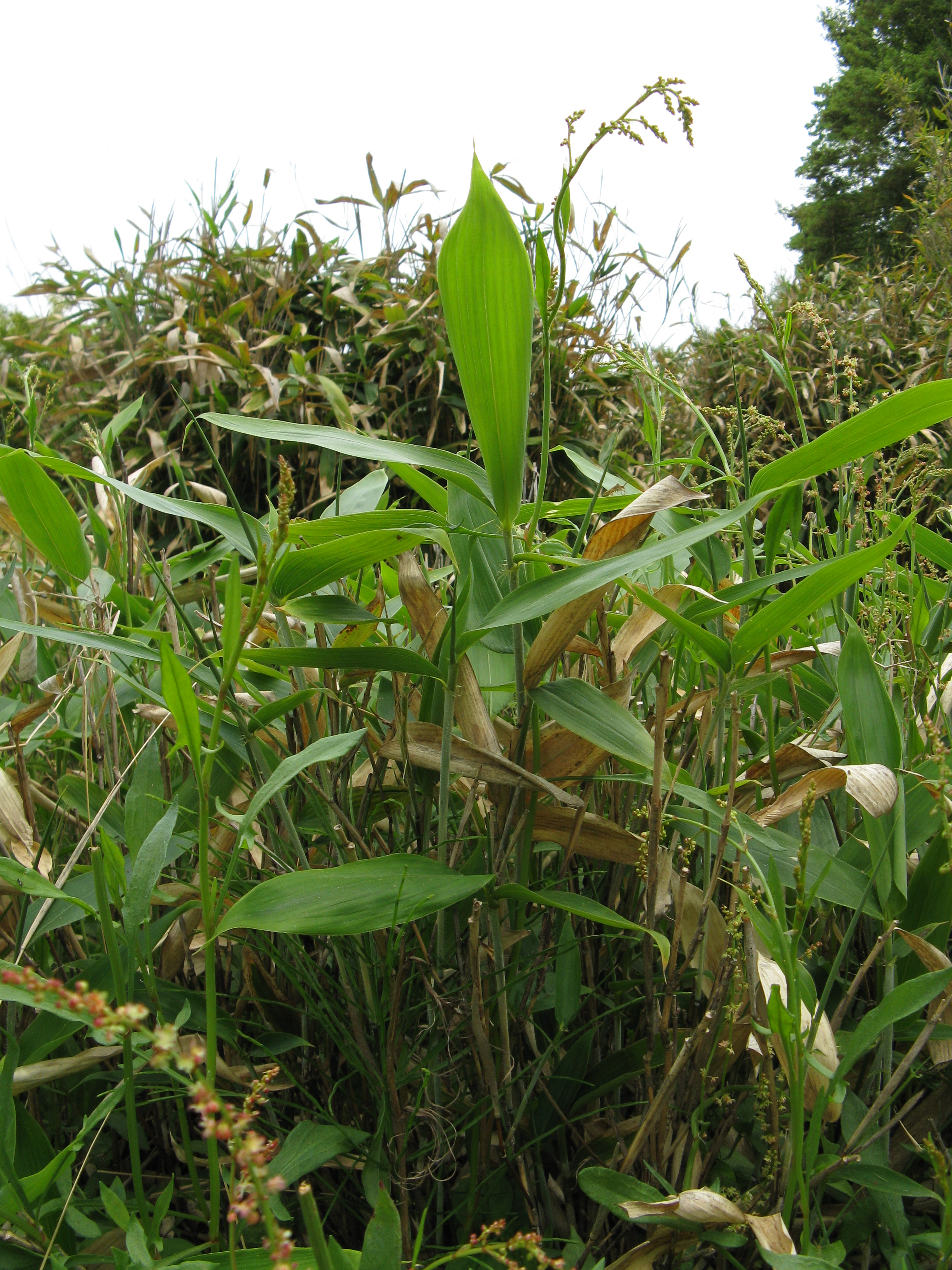 Scientific name Sasa veitchii